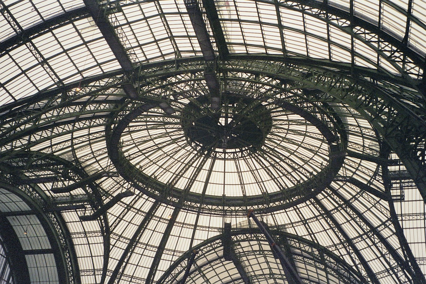 Grand Palais, Paris, France